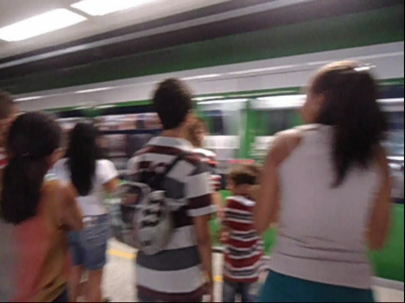 Trem da metrofor chegando na estação são benedito